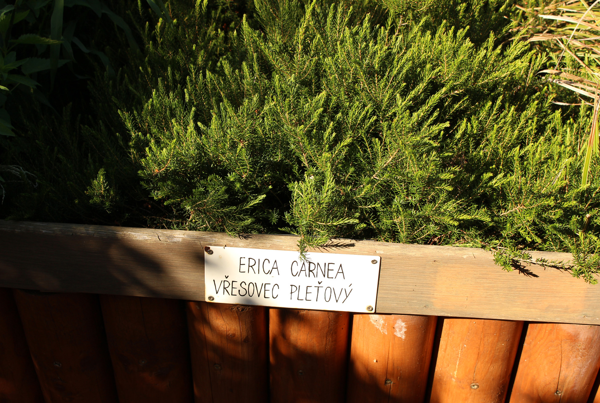 Vřesovec pleťový, Erica carnea, Olomouc, Bezručovy sady